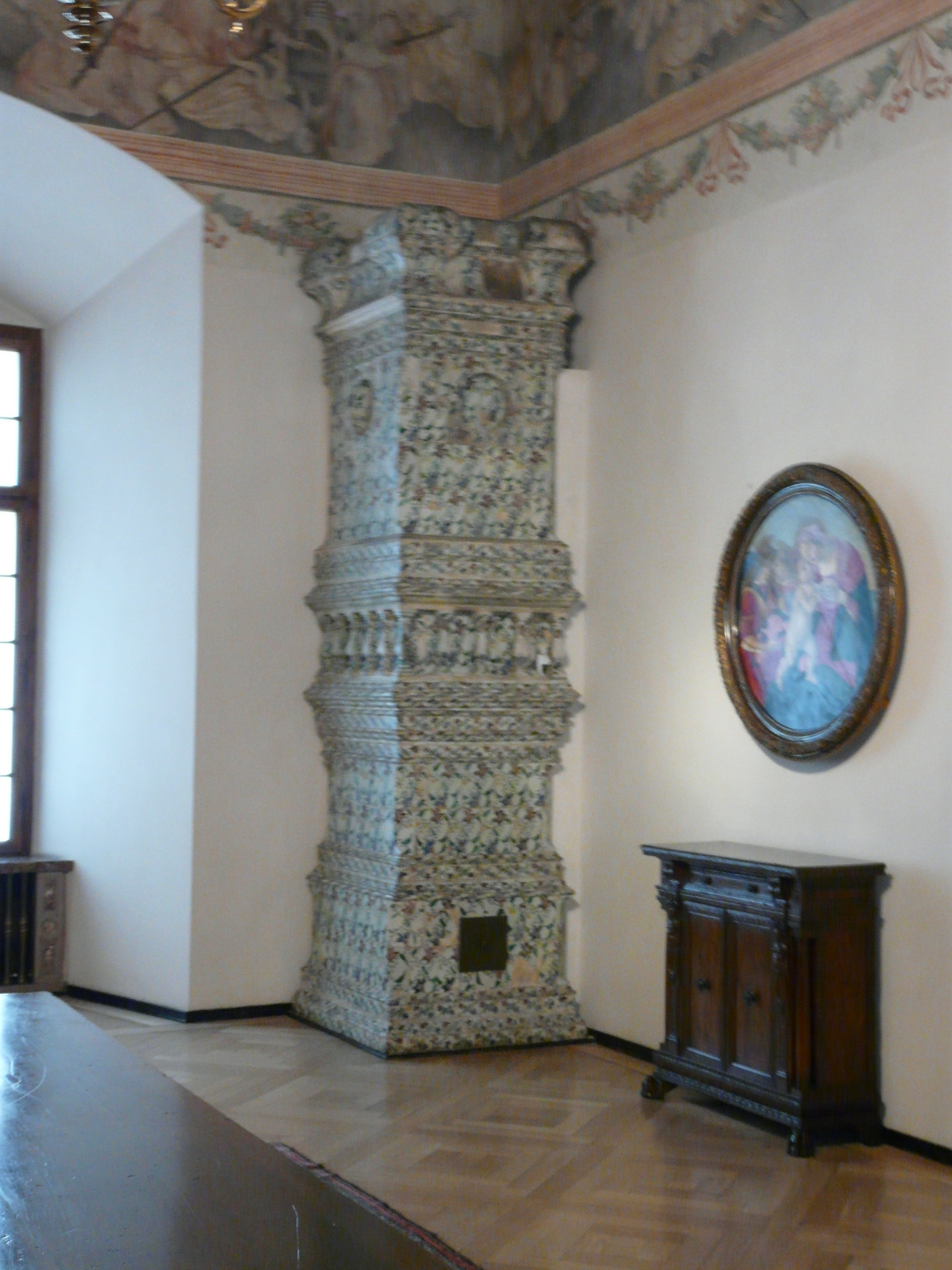 Kraków